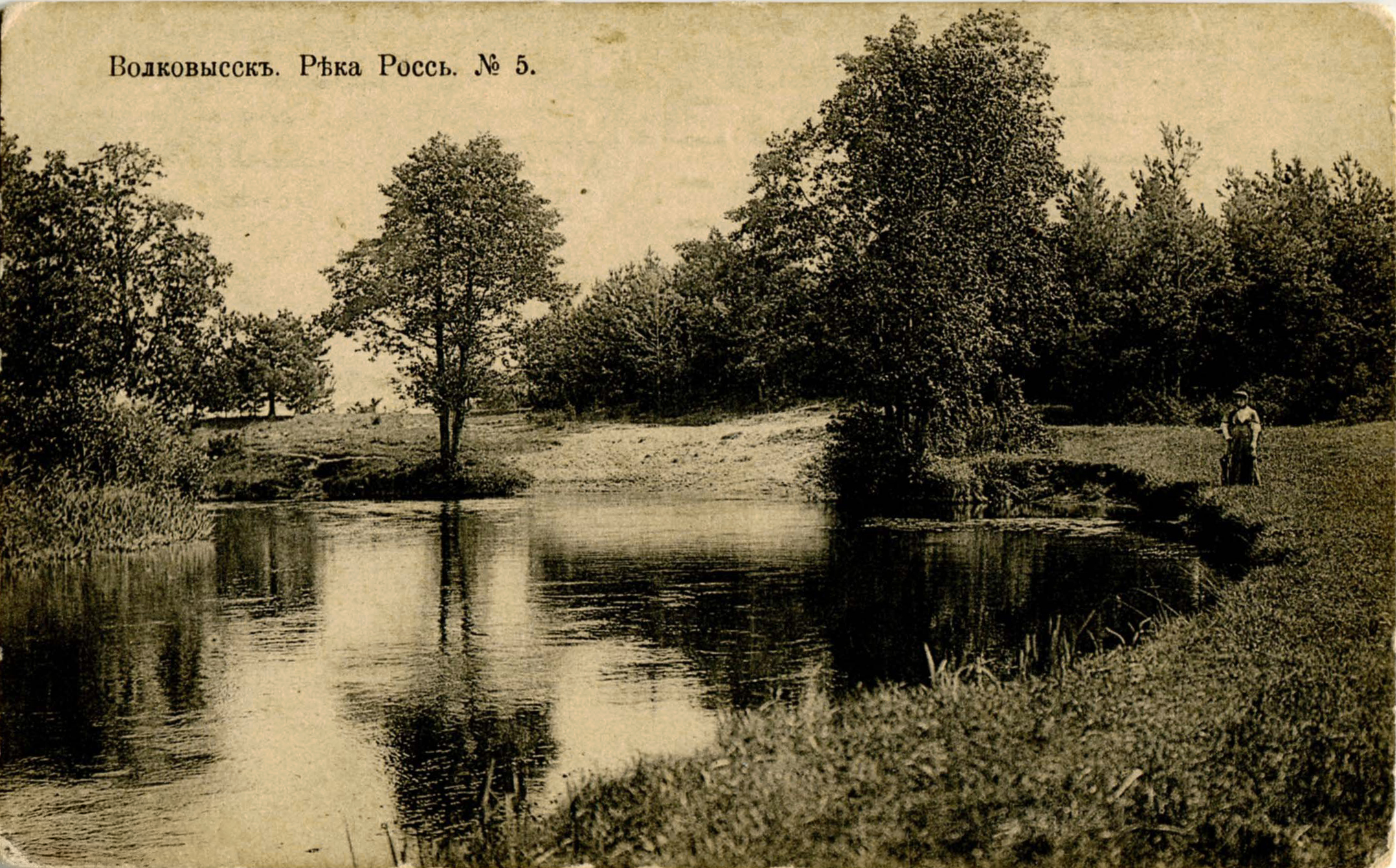 Беларуская (тарашкевіца): Ваўкавыск (Vaŭkavysk), рака Рось (Roś)